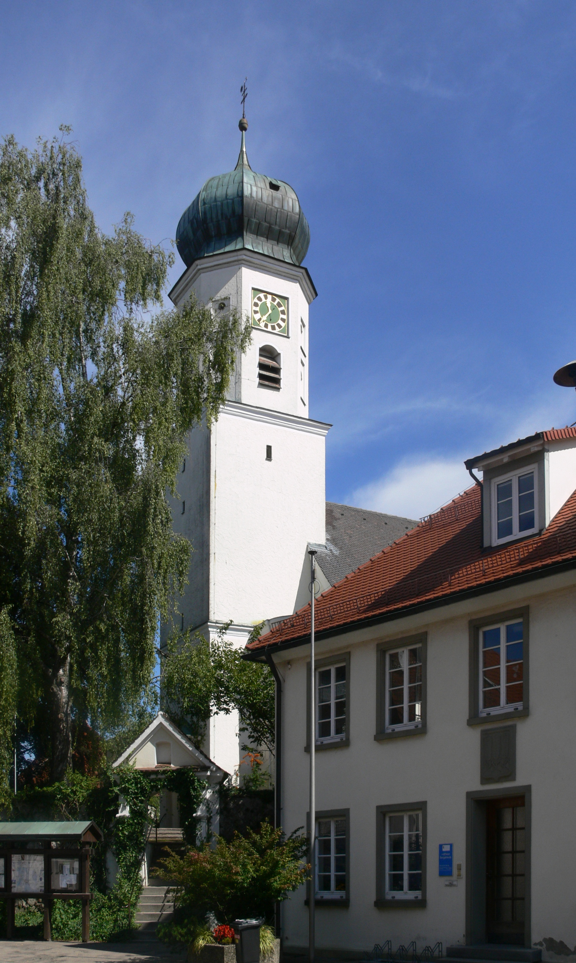 Pfarr- und Wallfahrtskirche St. Philippus und Jakobus, Bergatreute: Ansicht von der Straße